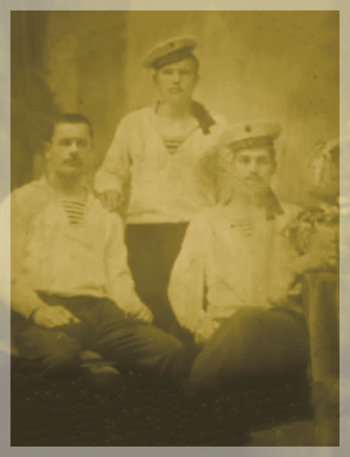 Жители села Большой Камаган, представители Сибирского Казачьего войска в период Русско-Китайской войны 1900-1901 годов.